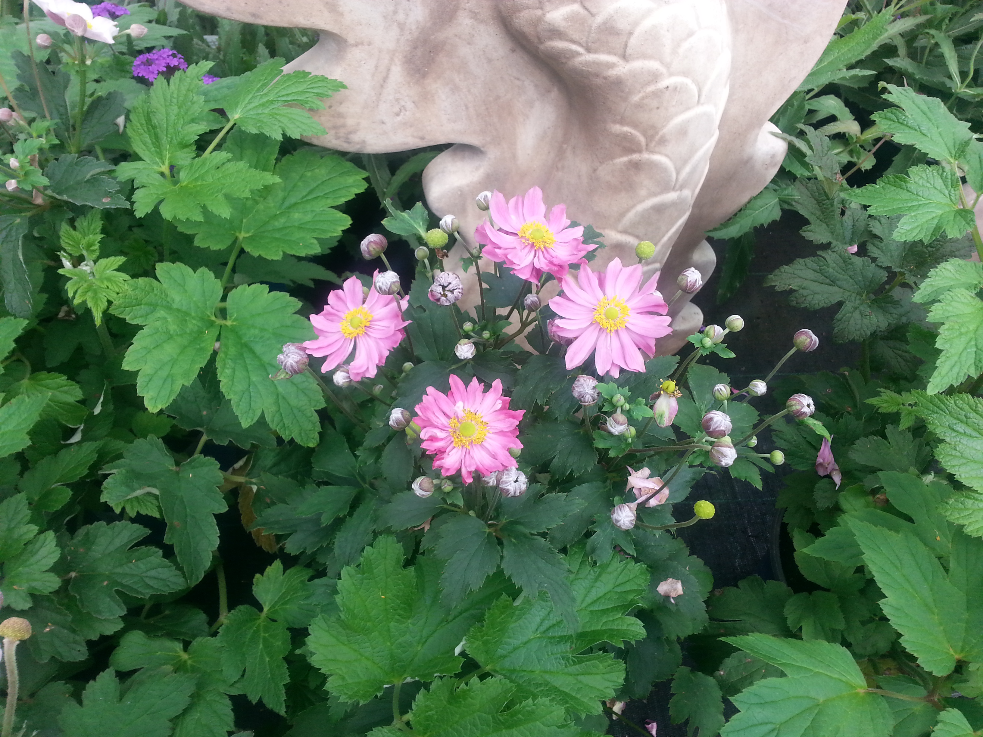 Herbstanemone